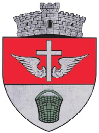 Stema comunei Bălușeni, Botoșani